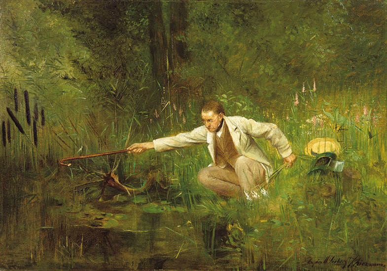 Der Botaniker